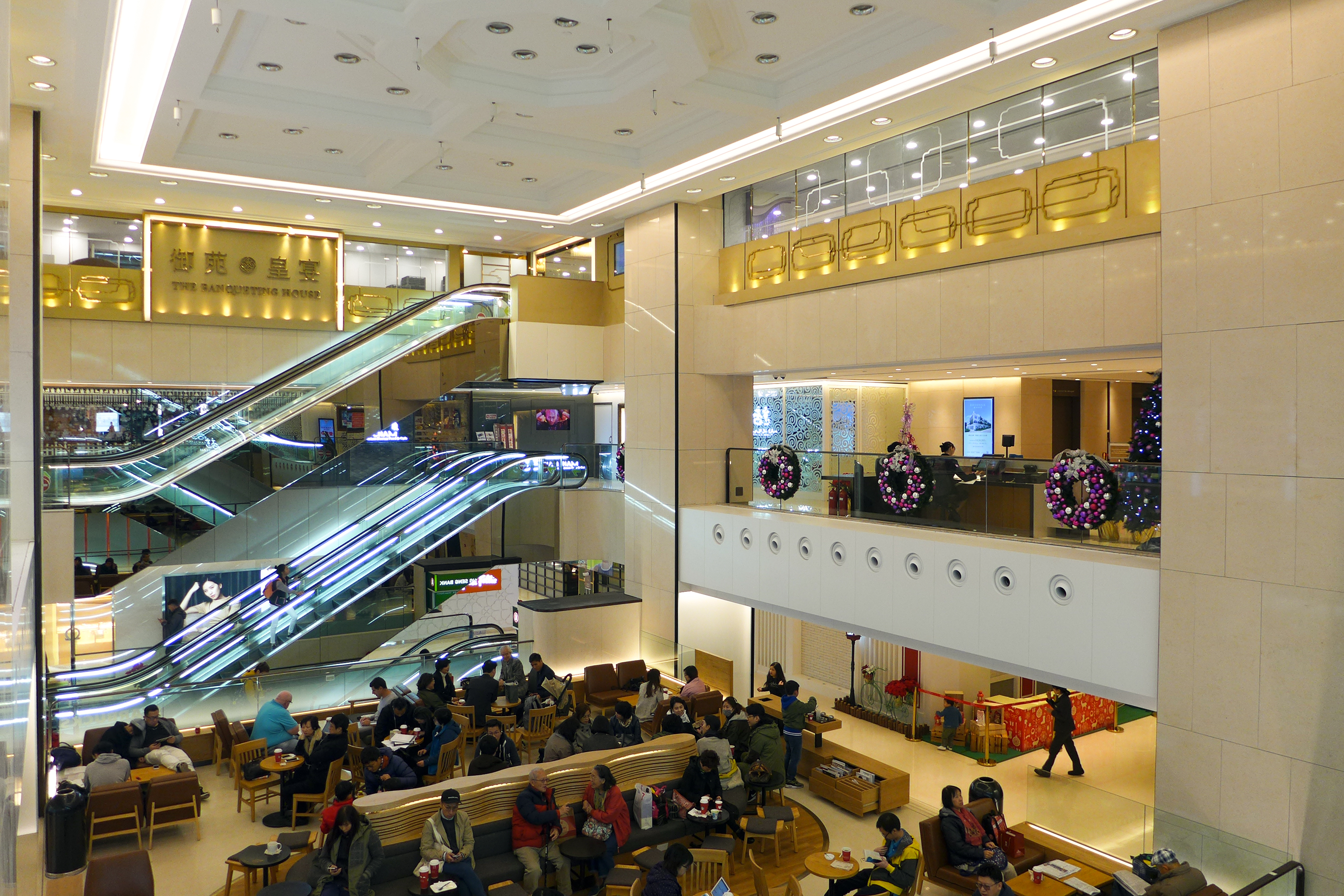 Empire Centre Atrium